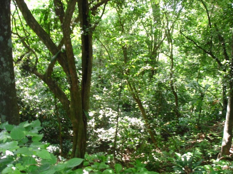 Mata_Atlântica, vegetação que forma o Morro_do_Moreno. FOto tirada por Ielton, no Morro do Moreno.